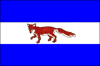 Vlag van de gemeente Vosselaar